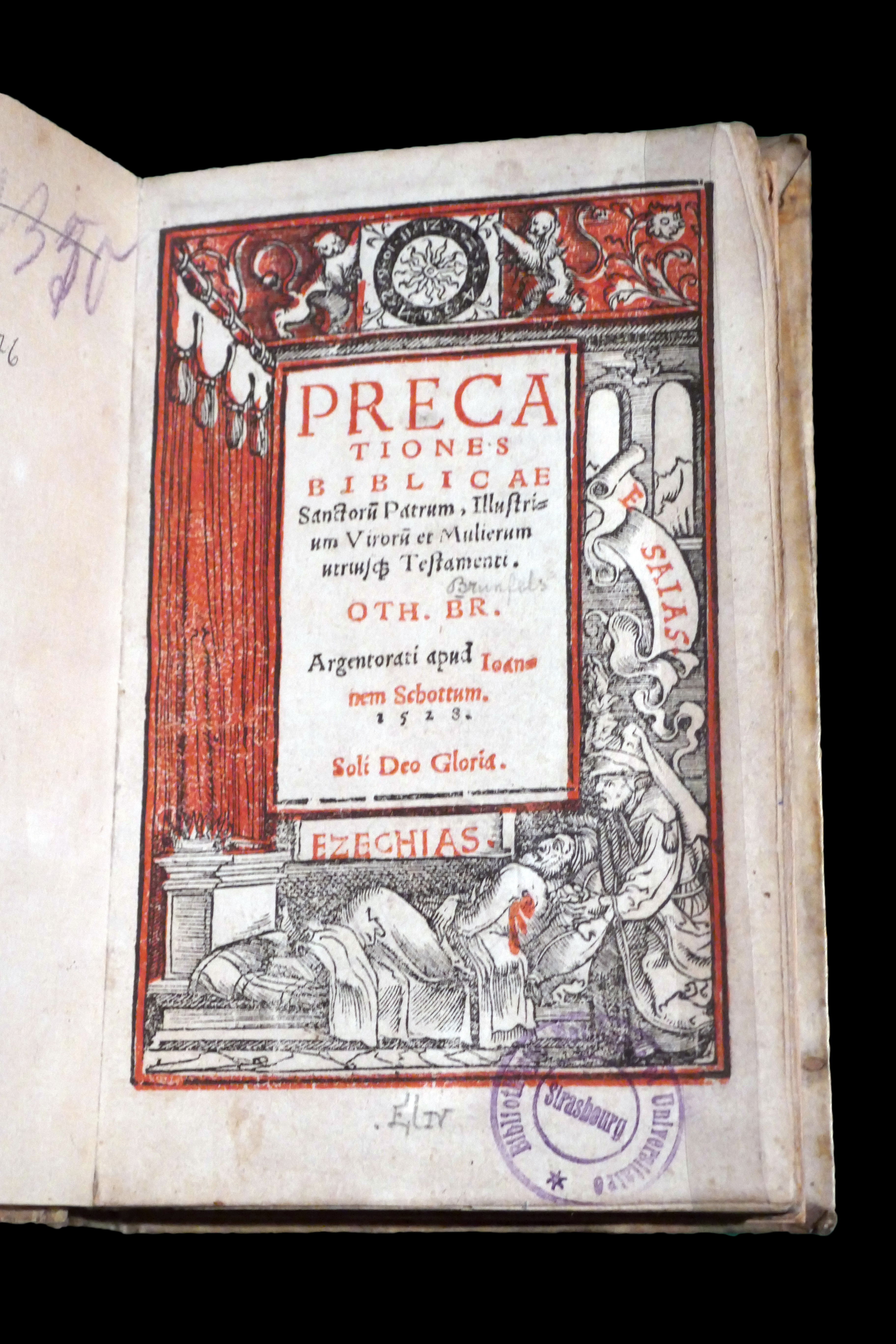 Otto Brunfels Page de titre de Precationes biblicae Sanctorum Patrum illustriumque virorum et mulierum utriusque Testamenti, Johann Schott, 1528 "Dieu invisible derrière le rideau" : l'image de titre (de Hans Weiditz) représente la prière du roi Ezéchias (2 Rois 20, I-II) à qui le prophète Esaïe vient annoncer qu'il doit se préparer à la mort. Le roi implore Dieu qui charge Esaïe de lui annoncer qu'il vivra quinze années de plus Bibliothèque nationale et universitaire de Strasbourg, présenté lors de l'exposition Hans Baldung Grien au musée de l'Oeuvre Notre-Dame.